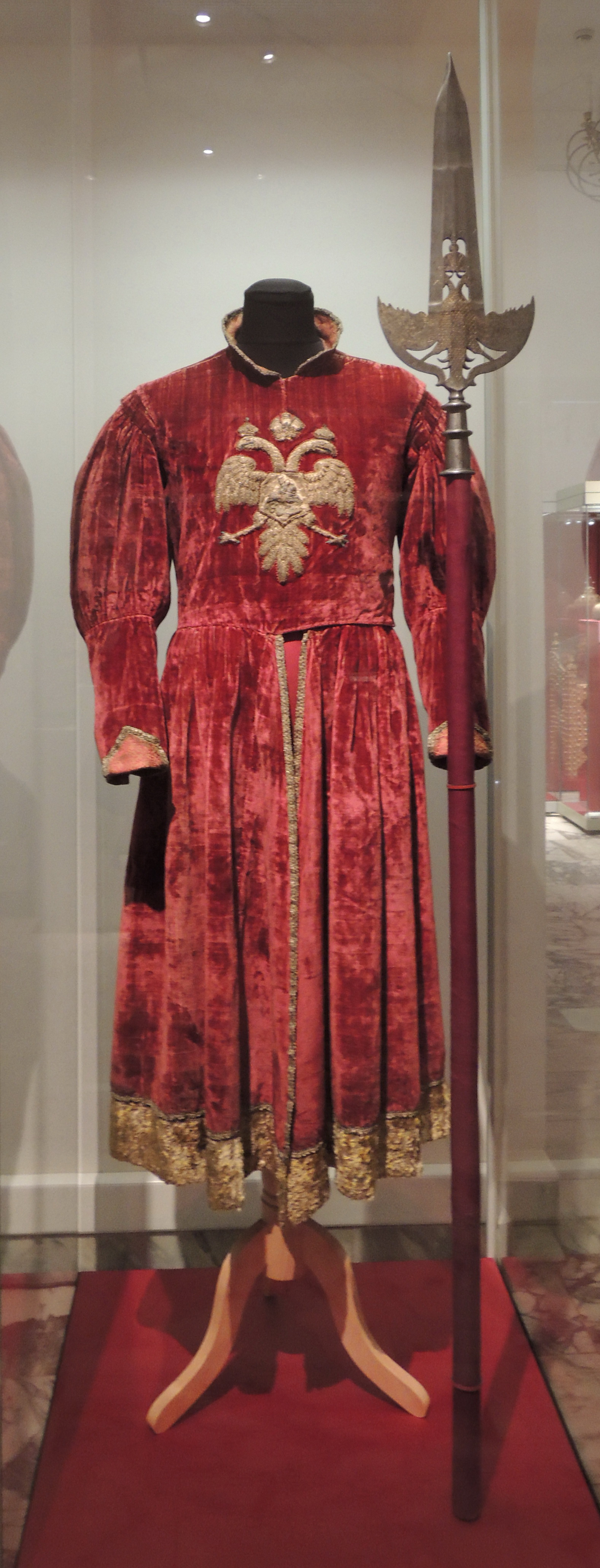 Парадные протазаны. Москва, мастерские Оружейной палаты. Вторая половина 1650-х-1660-е гг. Железо, дерево, бархат, галун, нити шелковые, резьба, золочение. ММК. Ими вооружались "жильцы" - кремлевская стража. Форменные кафтаны. Мастерские Кремля. 2-я пол. 17 века. Бархат гладкий, камка, Италия 17 век., бархат "косматый" - Гданьск, 17 век. Бархат, камка, золотная и шелковая нить, галун, шитье. ММК. Эти кафтаны называются "терлики". Подобные одежды хранились в государственной казне и выдавались лишь на время официальных церемоний.